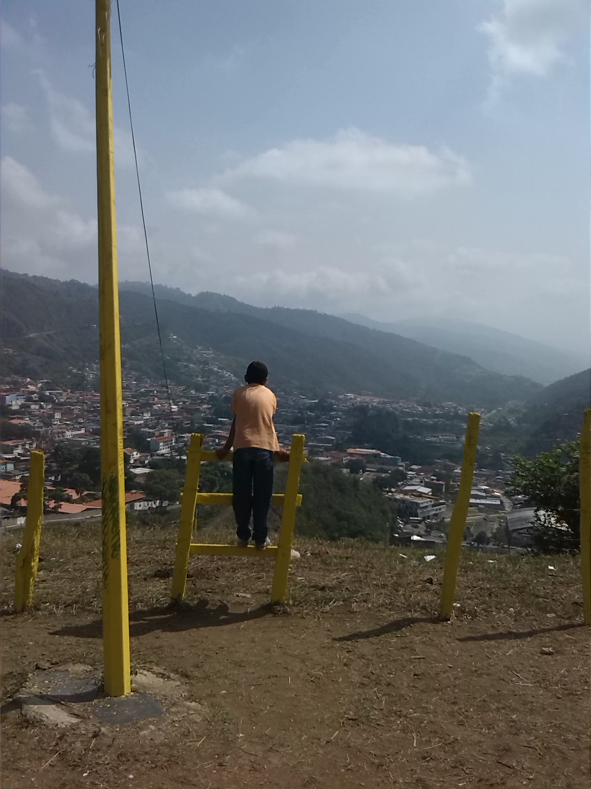 paisaje